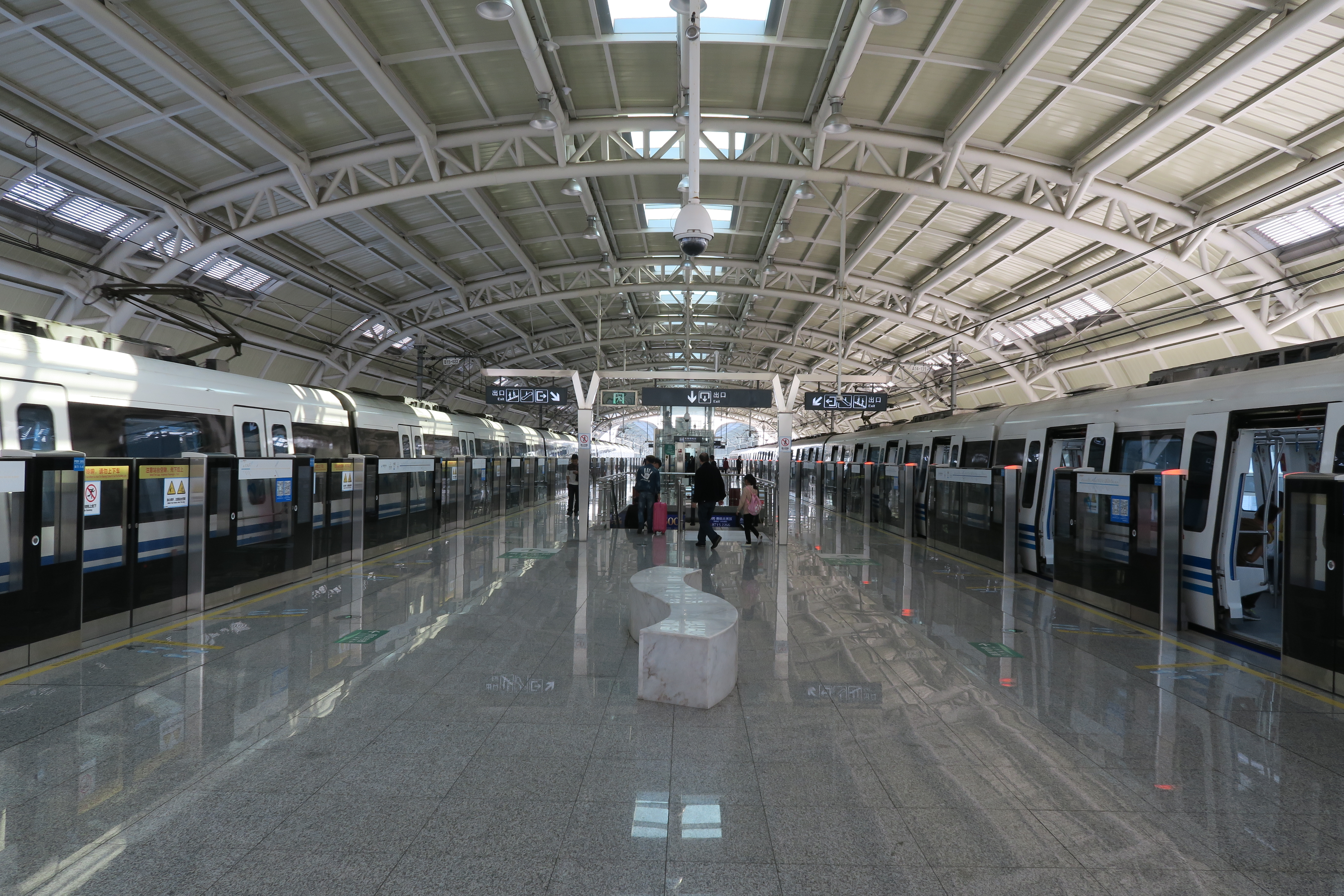 宁波轨道交通大碶站